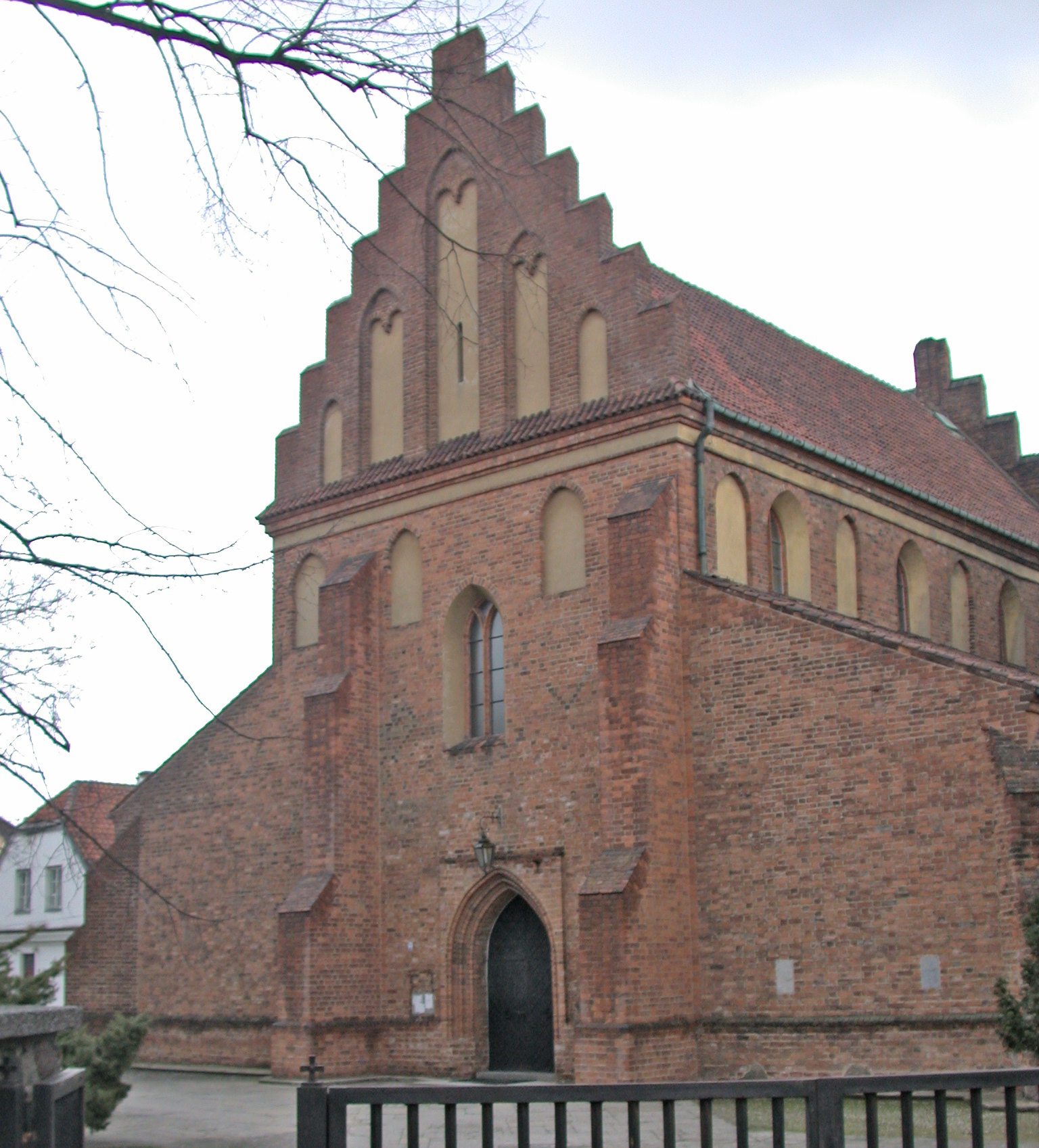 Varsavia, chiesa della Visitazione di Santa Maria (Kósciół H Nawiedzenia NMP), fiacciata sulla via Przyrynek